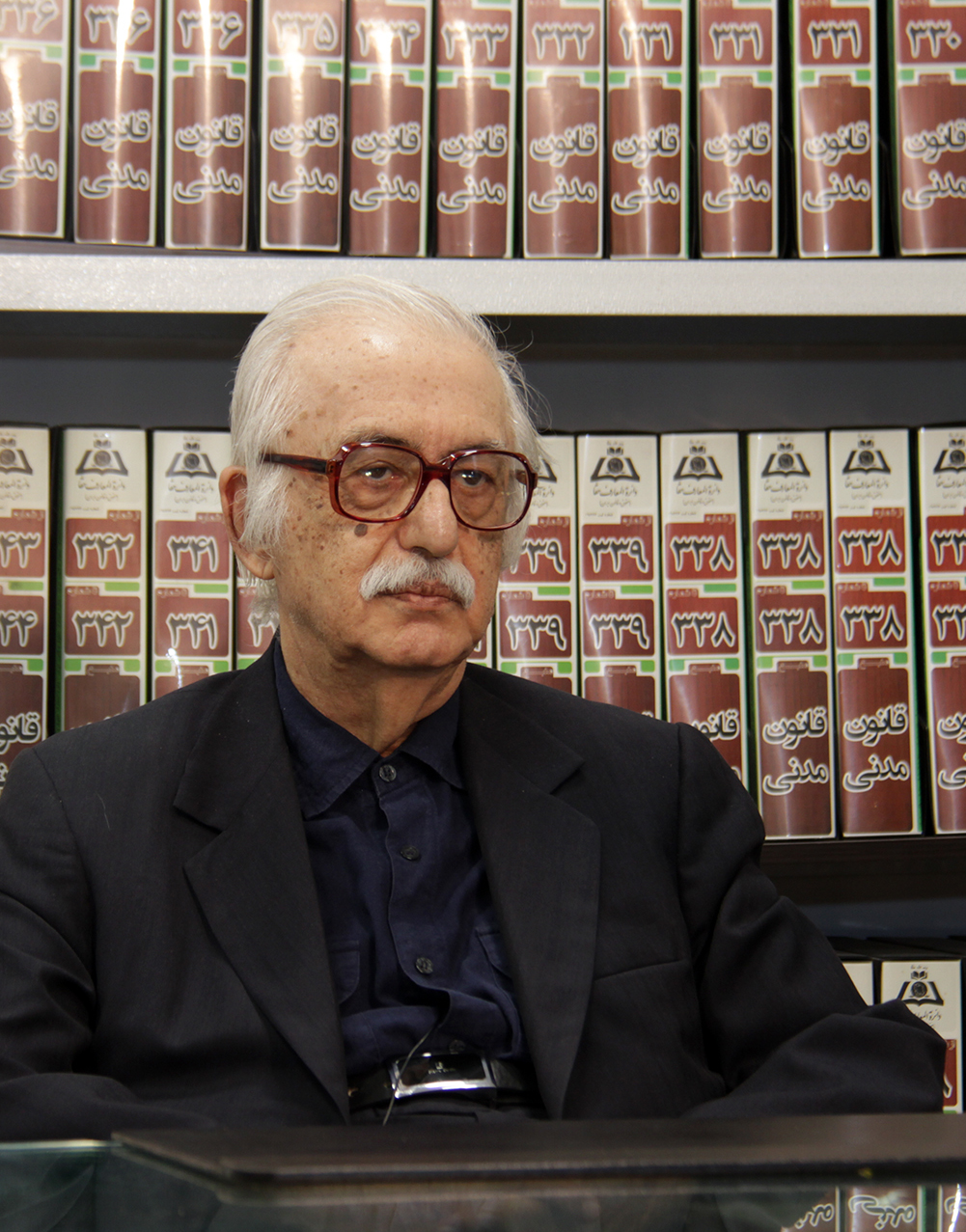 حسنعلی درودیان در مرکز پژوهشی دانشنامه های حوقی علامه